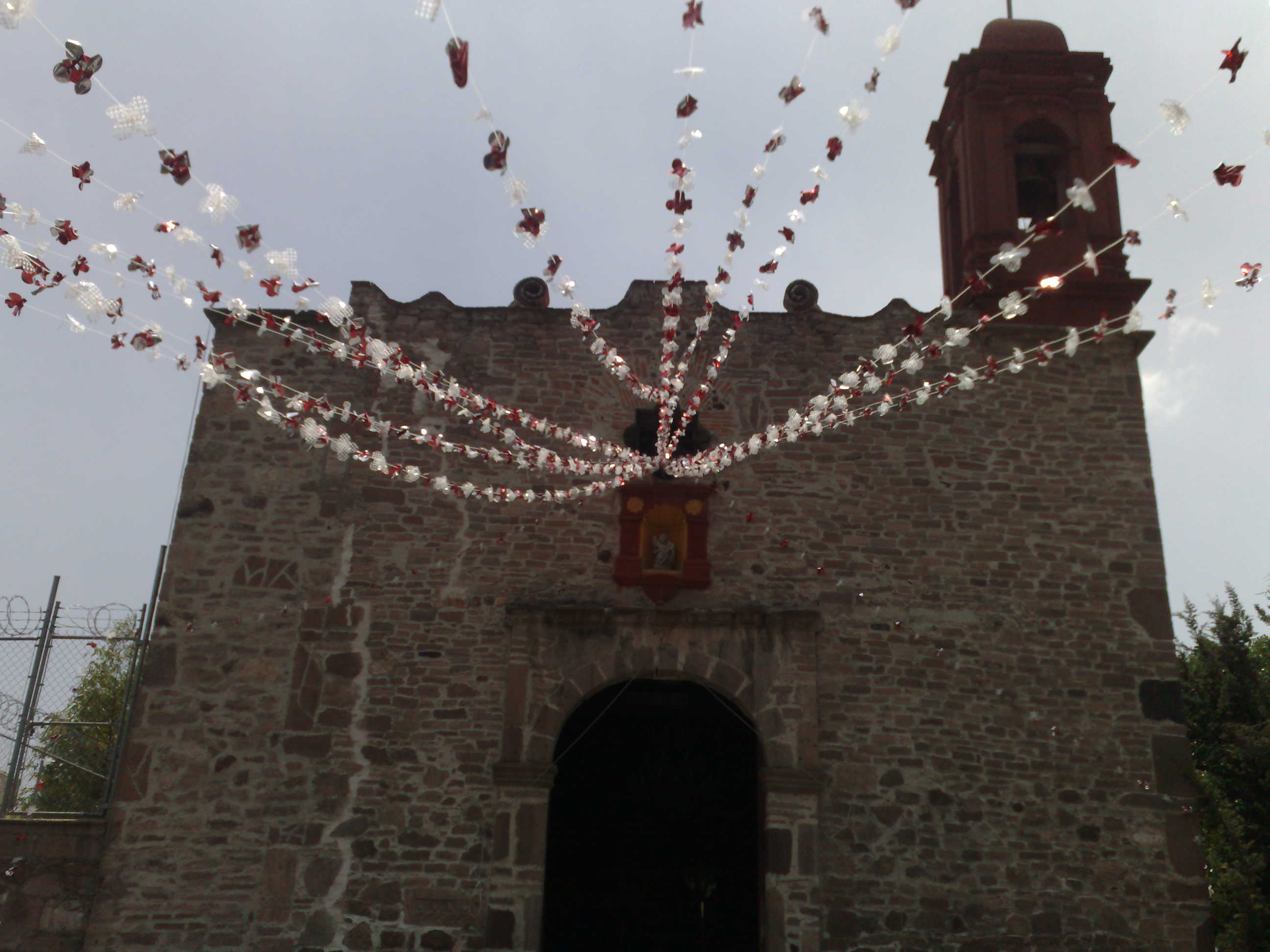 Adyacente a la Pirámide de Tenayuca, y construída con piedras tomadas de ésta